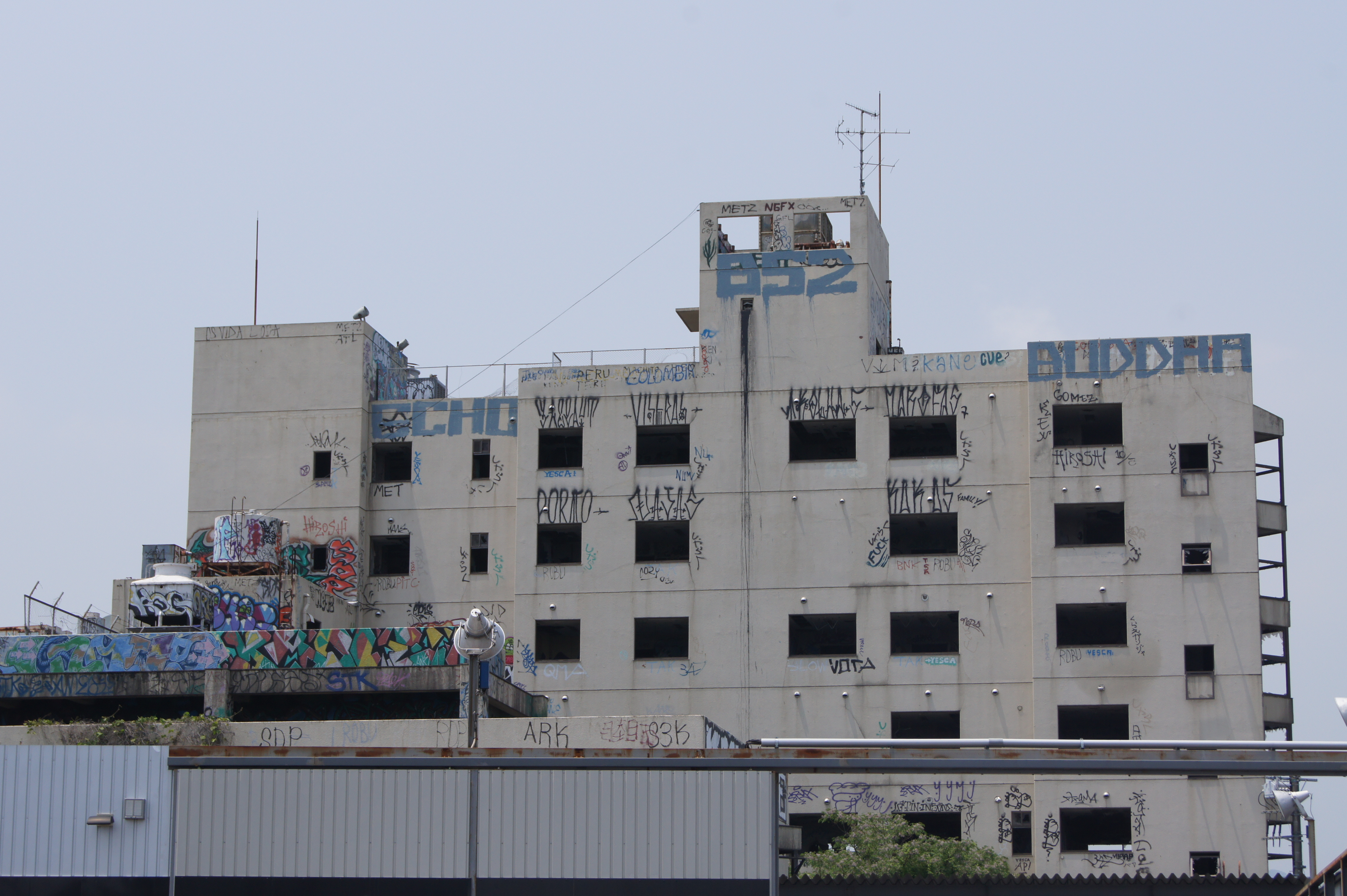 恵心病院を正面より撮影